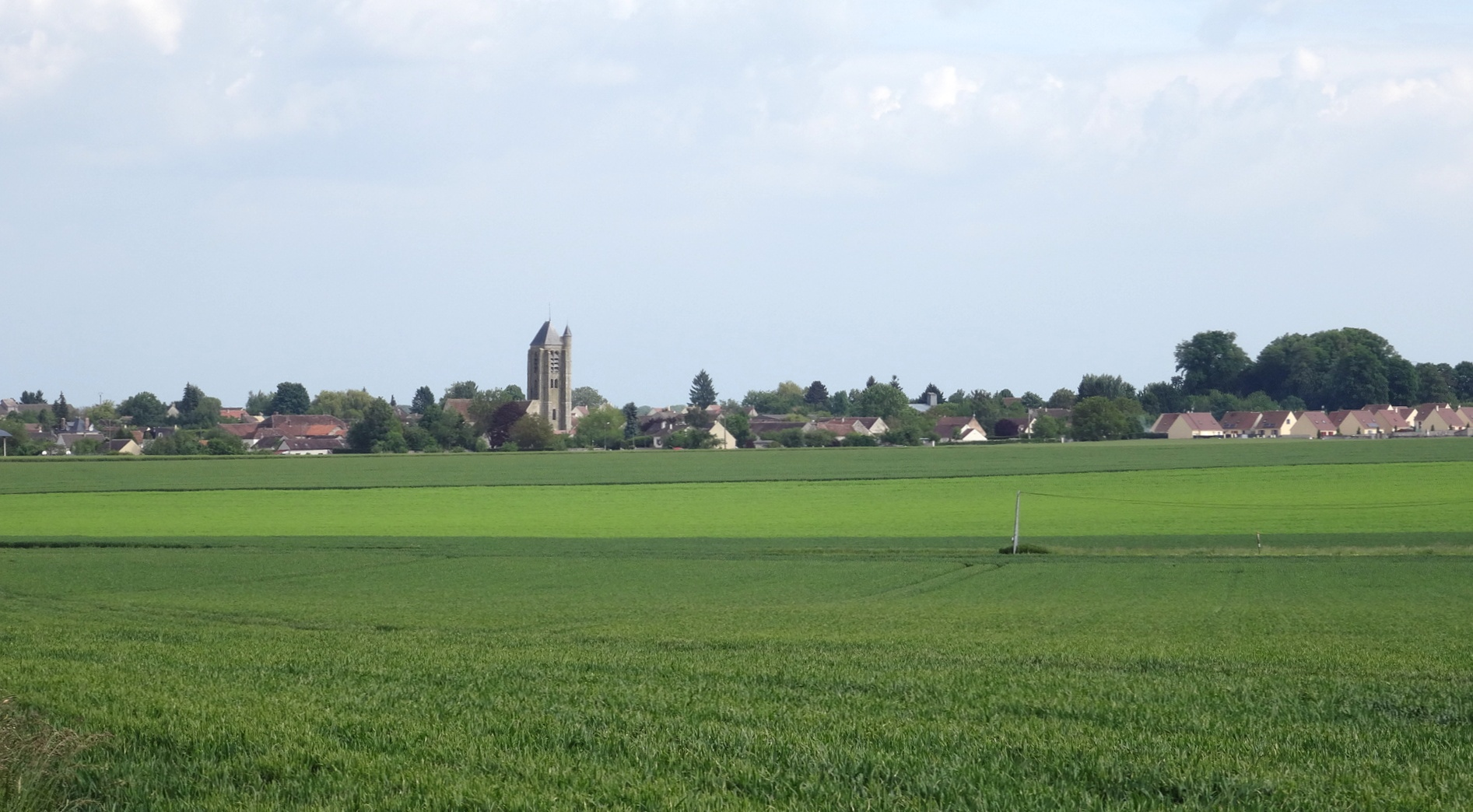 Village de Sourdun. Seine-et-Marne, région Île-de-France).